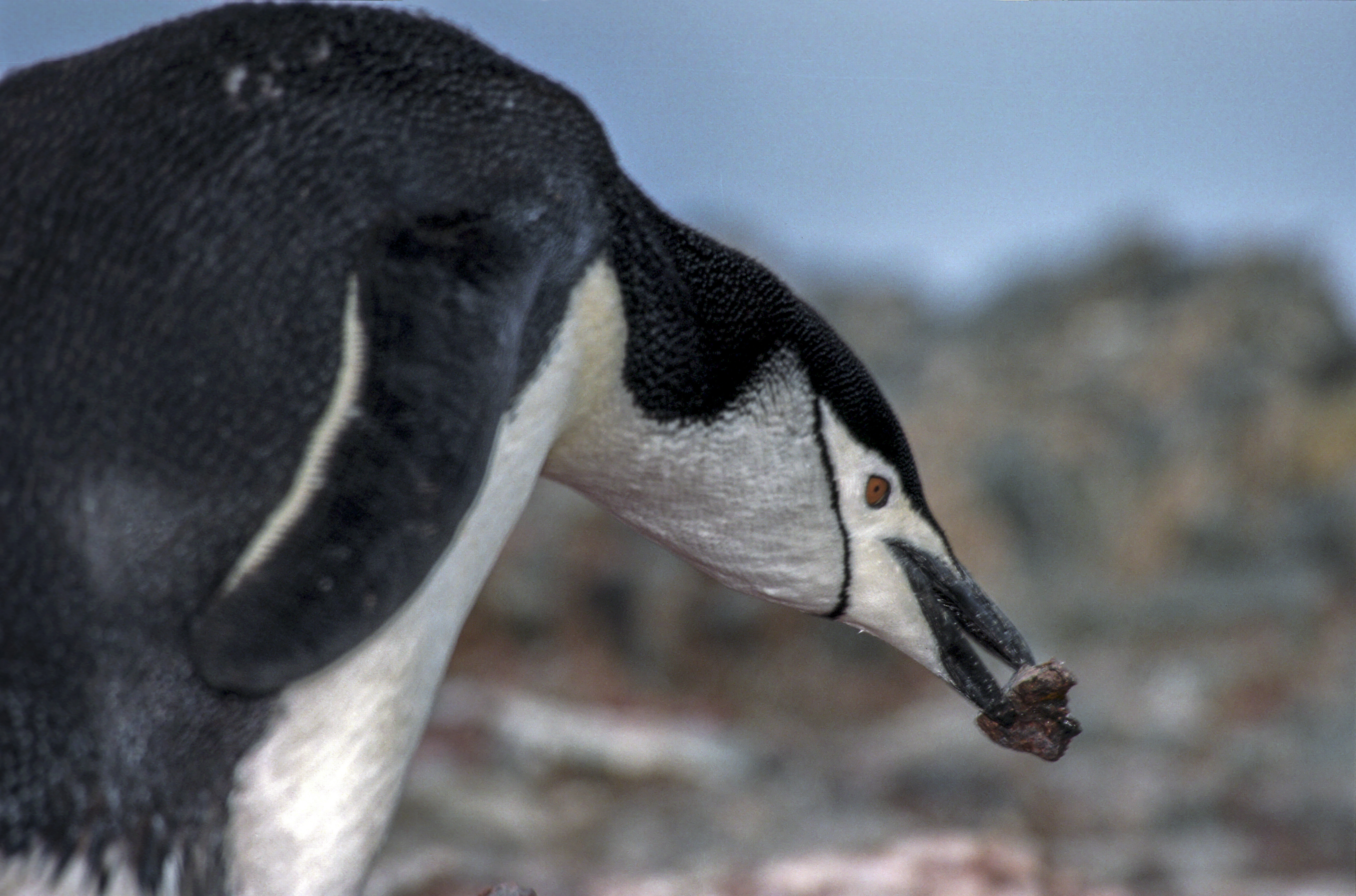 Antarctic